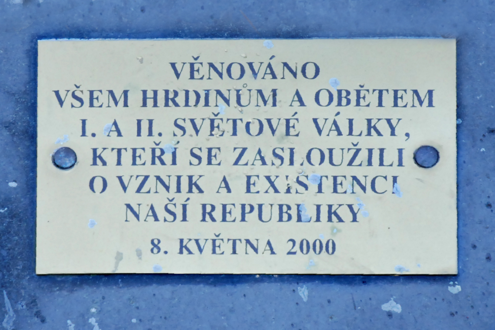 Pamětní deska na pomníku obětem 1. a 2. světové války v Karlových Varech